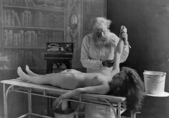 Autopsy